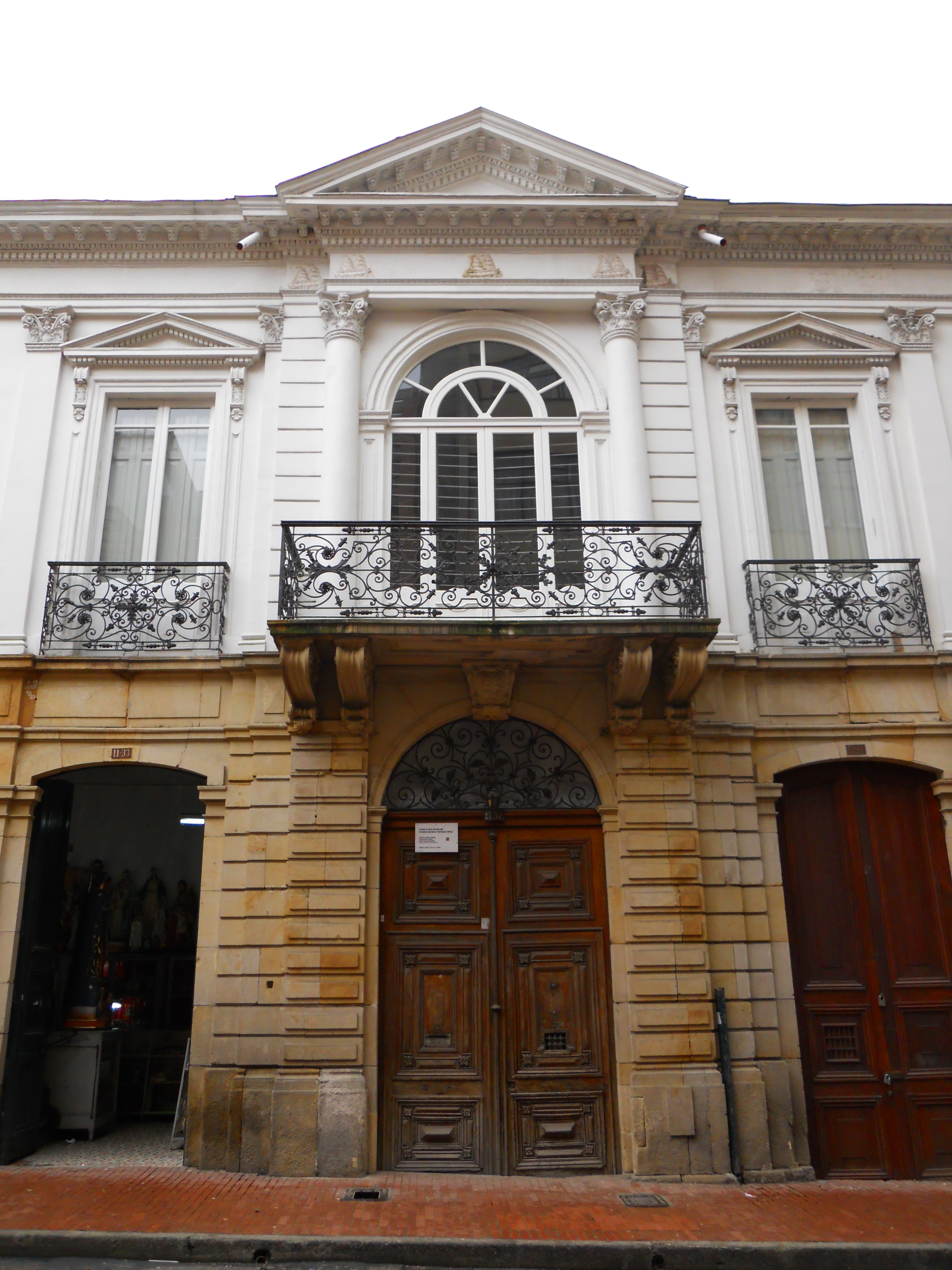 Casa Camacho, diseñada por Gaston Lelarge, carrera 6 con calle 11 en La Candelaria, Bogotá D. C.